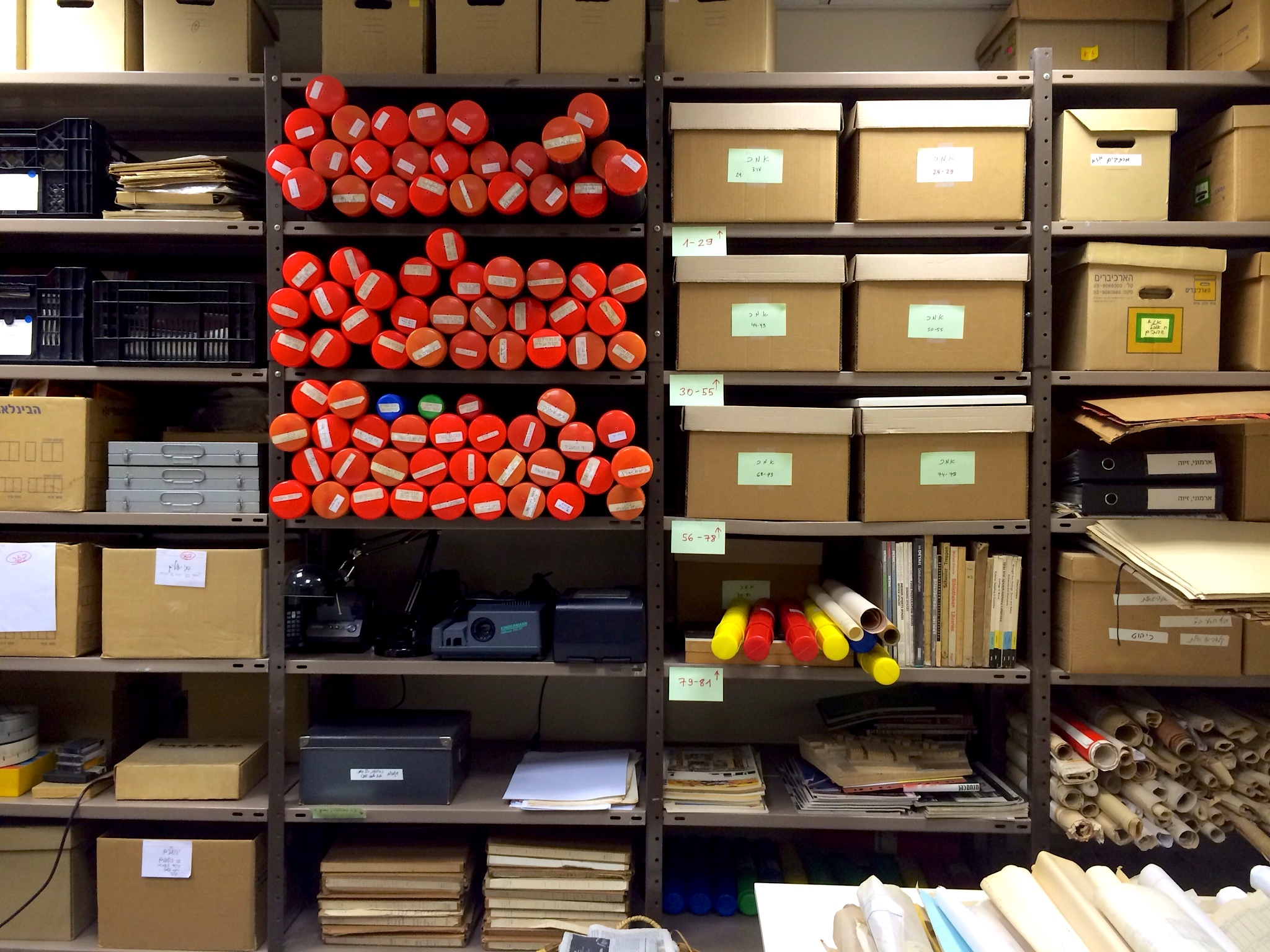 הקמת חדר האוספים האישיים בארכיון אדריכלות ישראל, 2013. מימין לשמאל: אוסף זיוה ארמוני, אוסף מנחם כהן, אוסף גרשון צפור